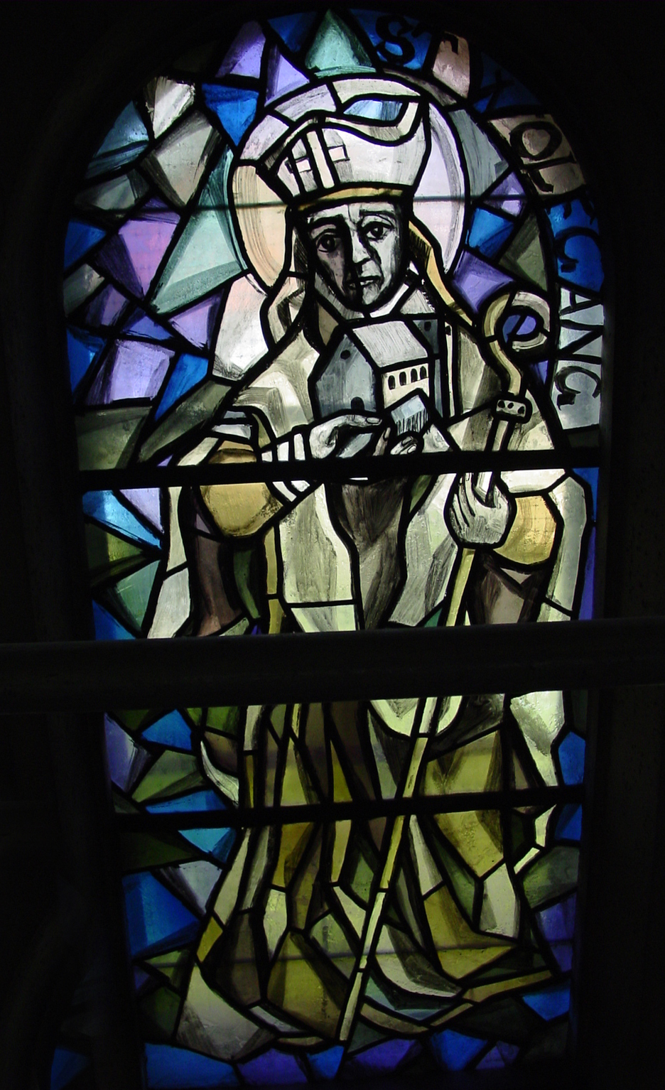 Kirchenfenster von Wolfgang in der Pfarrkirche Liesing (Wien 23) Bild von mir selbst aufgenommen im Sommer 2005